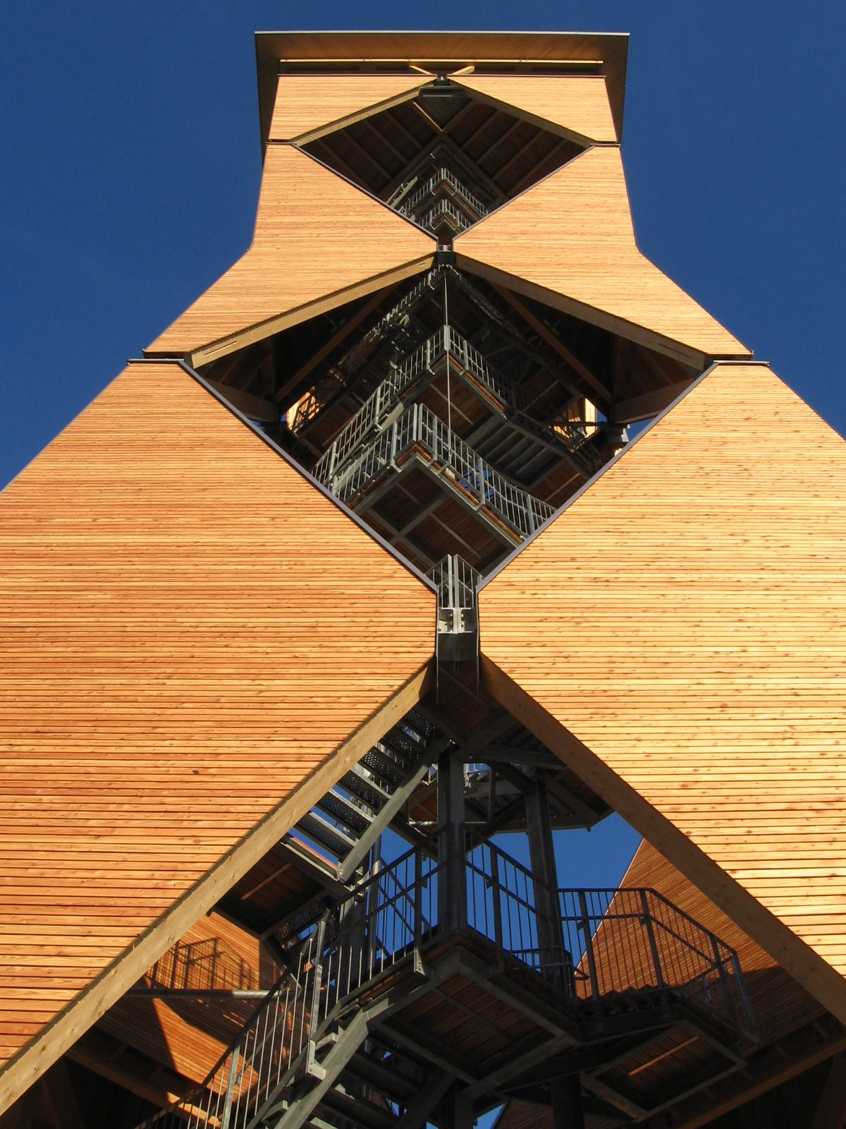 Eine Detailansicht des Altenbergturms. Die hölzernen Schrägen der durchbrochenen Außenverschalung schütten im Winter dort abgelagerten Schnee auf die Anstiegstreppe.